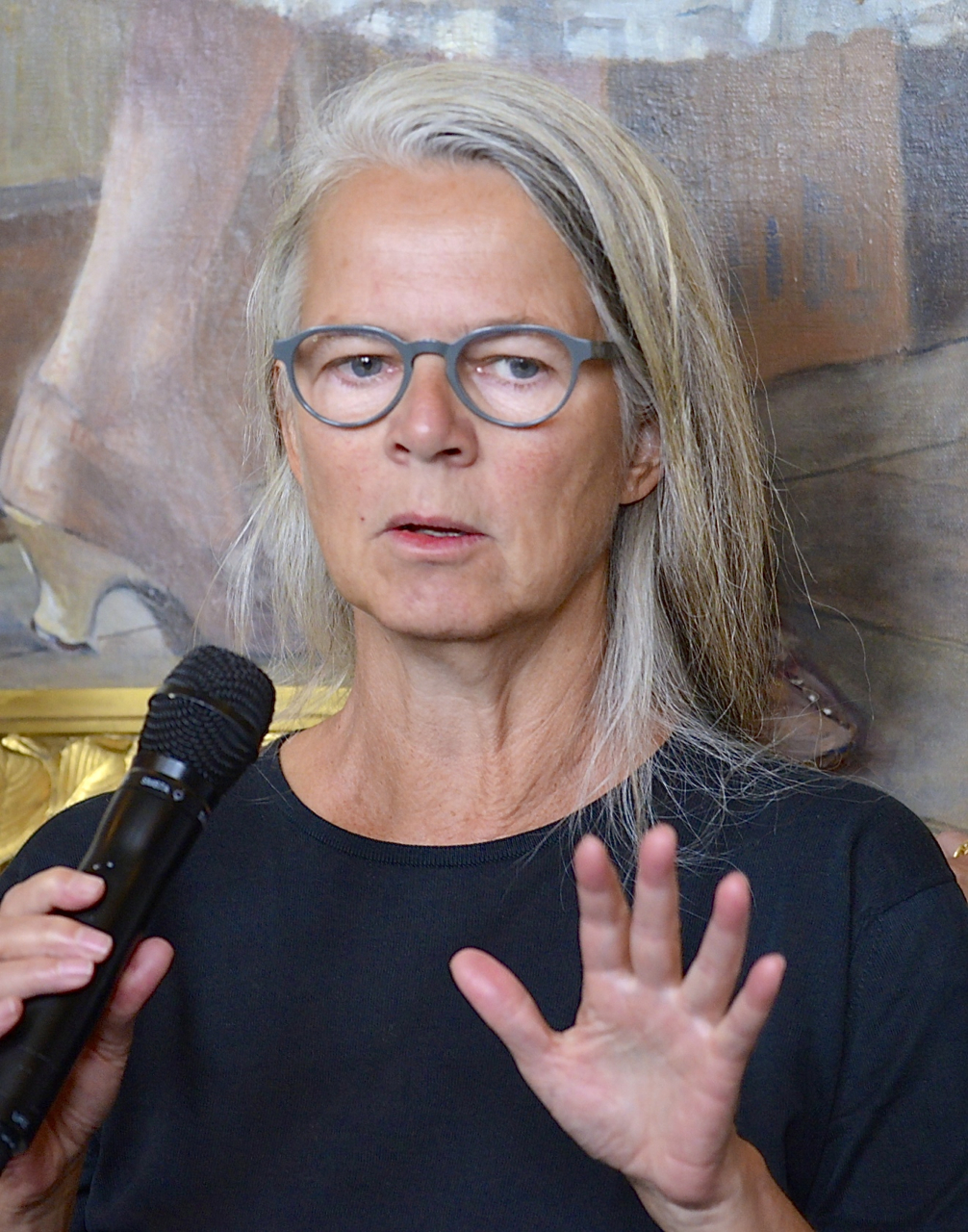 Bente Lykke Møller under Dramatens höstsamling 2014.